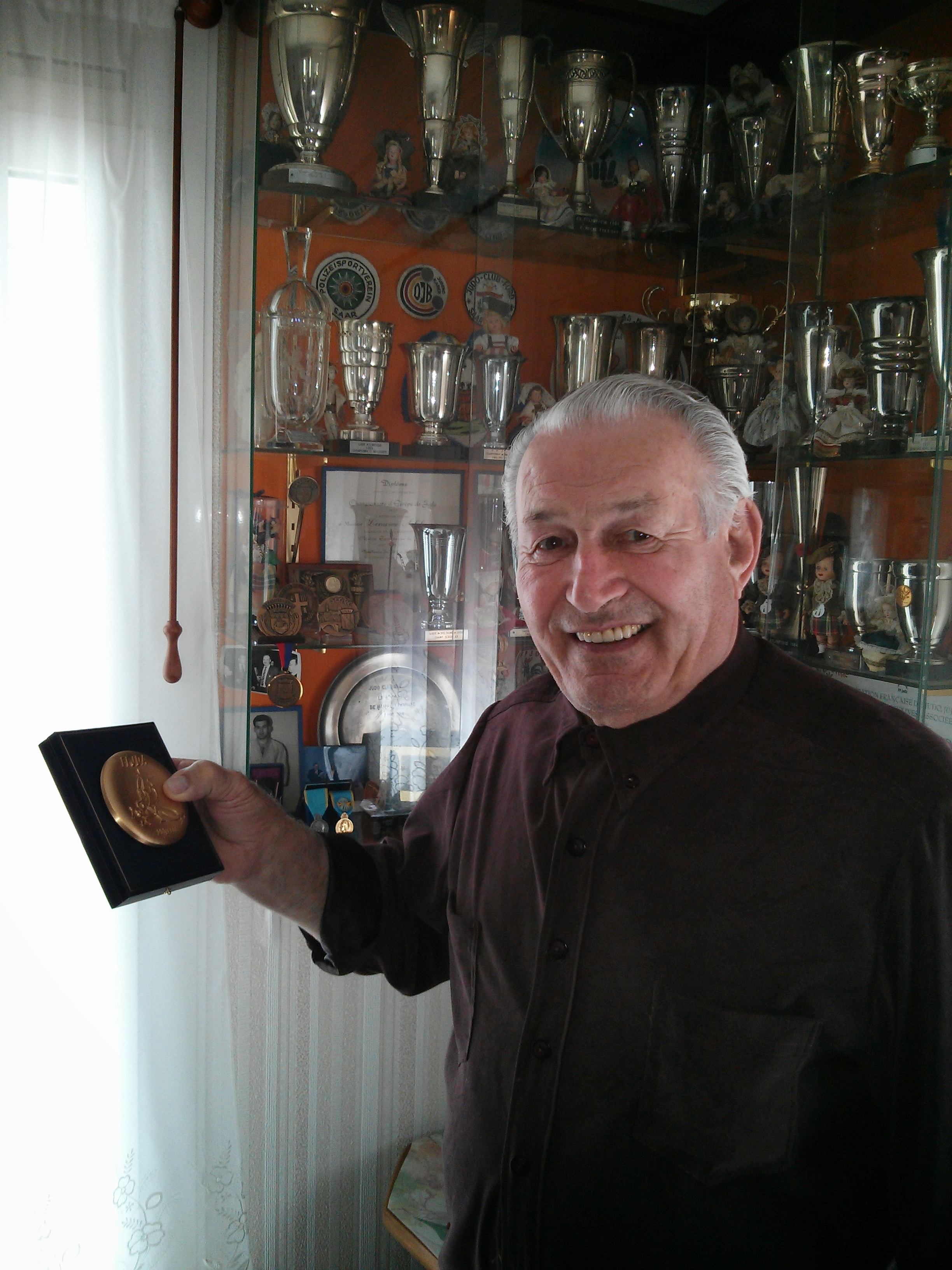 Alphonse Lemoine et sa médaille d'or de la FFJ